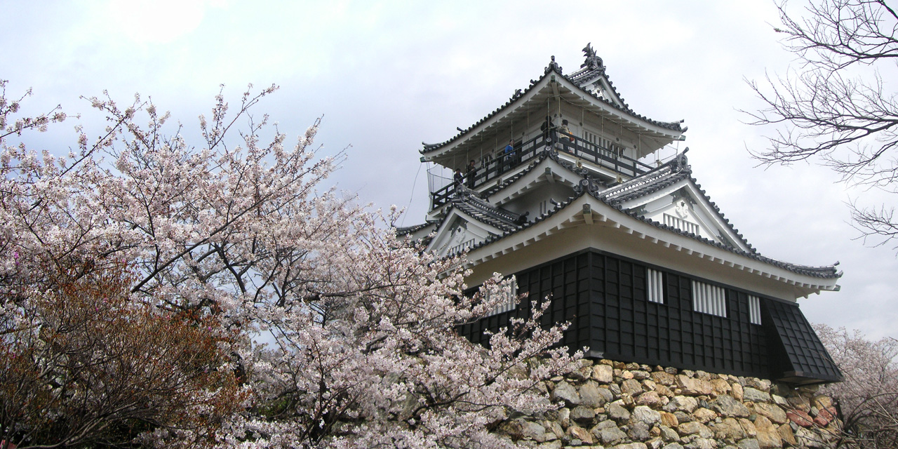 Japon, chateau de Hamamatsu et les cerisiers en fleurs.